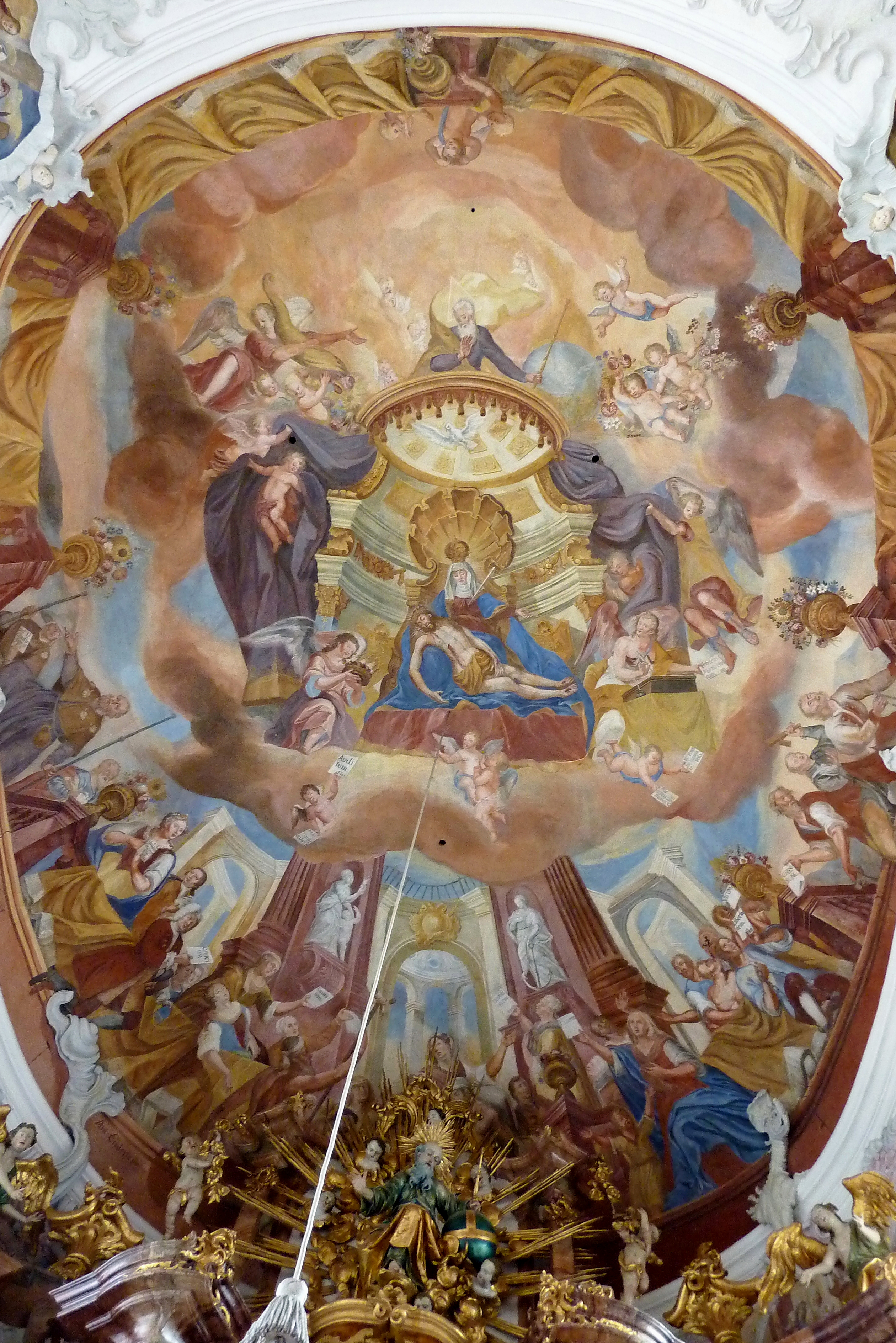 Katholische Pfarr- und Wallfahrtskirche Mariä Schmerzen in Waldkirch, einem Ortsteil von Winterbach (Schwaben), Deckenfresko im Chor von 1745 von Anton Enderle (1700-1761), Darstellung: die schmerzhafte Muttergottes als Gnadenvermittlerin